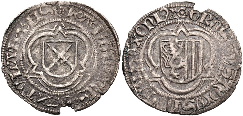 GERMANY, Sachsen (Kurfürstentum und Herzogtum). Friedrich III, Johann, and Albrecht. 1486-1500. AR Halbschwertgroschen (24mm, 1.73 g, 5h). Zwickau or Schneeberg mint. Dated (14)92. Coat-of-arms within trilobe / Coat-of-arms within trilobe. Levinson I-293. Good VF, toned.